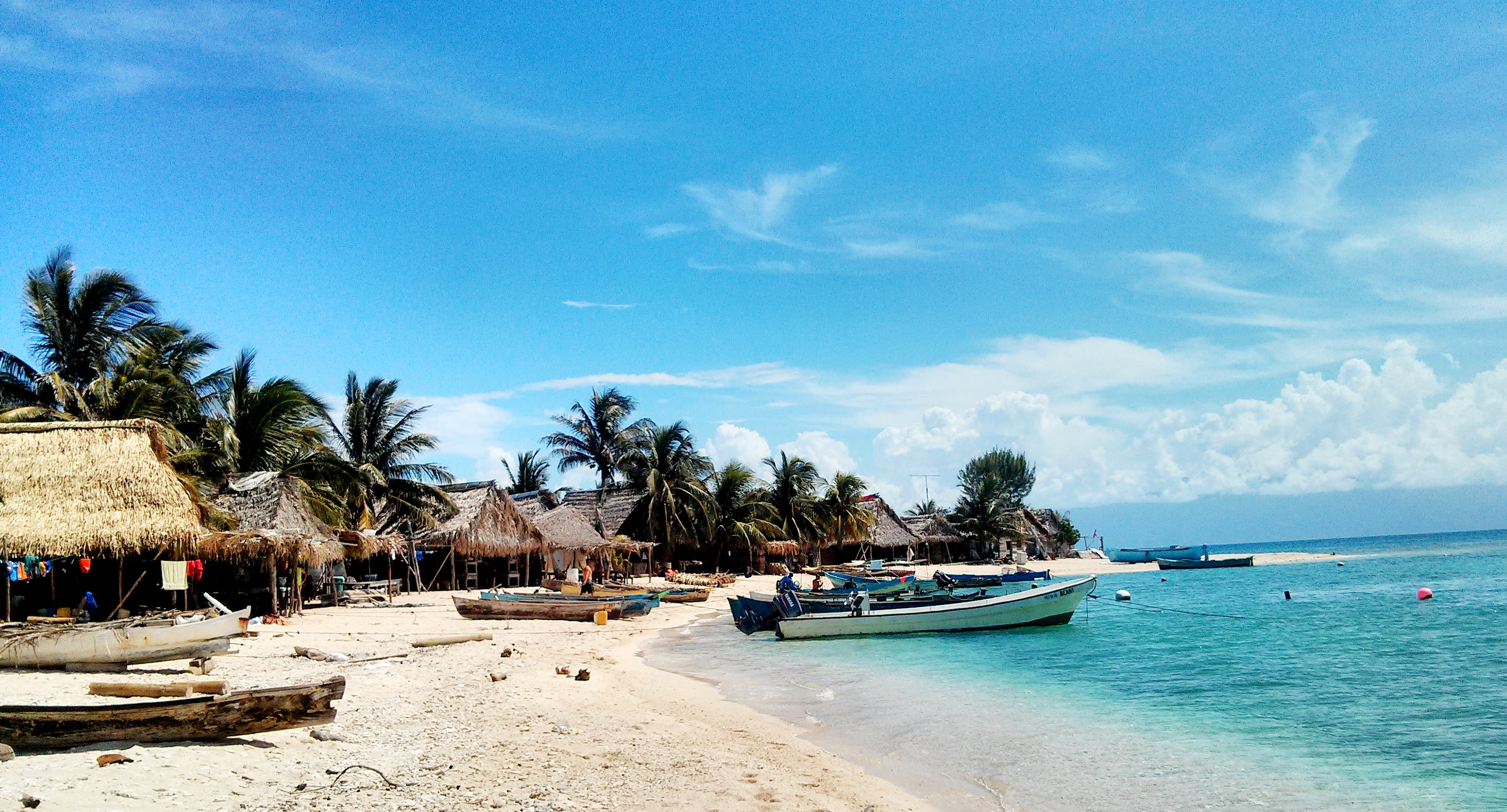 Este cayo es llamado Chachahuate 1, actualmente vive una comunidad garífuna donde puedes acceder a platos de deliciosa comida, y bebidas refrescantes en este paraíso tropical.